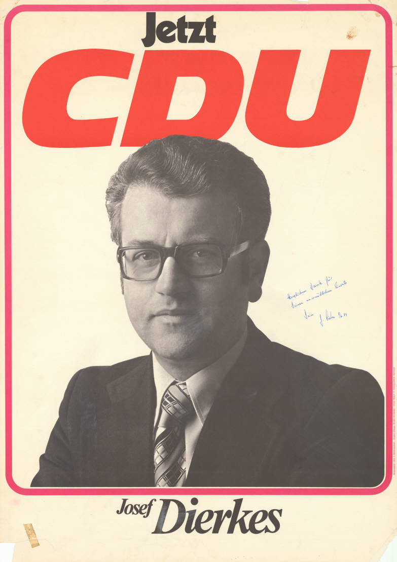 Jetzt CDU Josef Dierkes Abbildung: Porträtfoto Kommentar: Mit handschriftlicher Widmung: "Herzlichen Dank für Deinen unermüdlichen Einsatz Dein J. Dierkes 8/6.74" Plakatart: Kandidaten-/Personenplakat mit Porträt Künstler_Grafiker: Graphic Design Broder Brodersen, Hannover Auftraggeber: CDU in Niedersachsen Drucker_Druckart_Druckort: Wiily F.P. Fehling GmbH, Hannover Objekt-Signatur: 10-008 : 372 Bestand: Landtagswahlplakate Niedersachsen (10-008) GliederungBestand10-18: Landtagswahlplakate Niedersachsen (10-008) » CDU Lizenz: KAS/ACDP 10-008 : 372 CC-BY-SA 3.0 DE